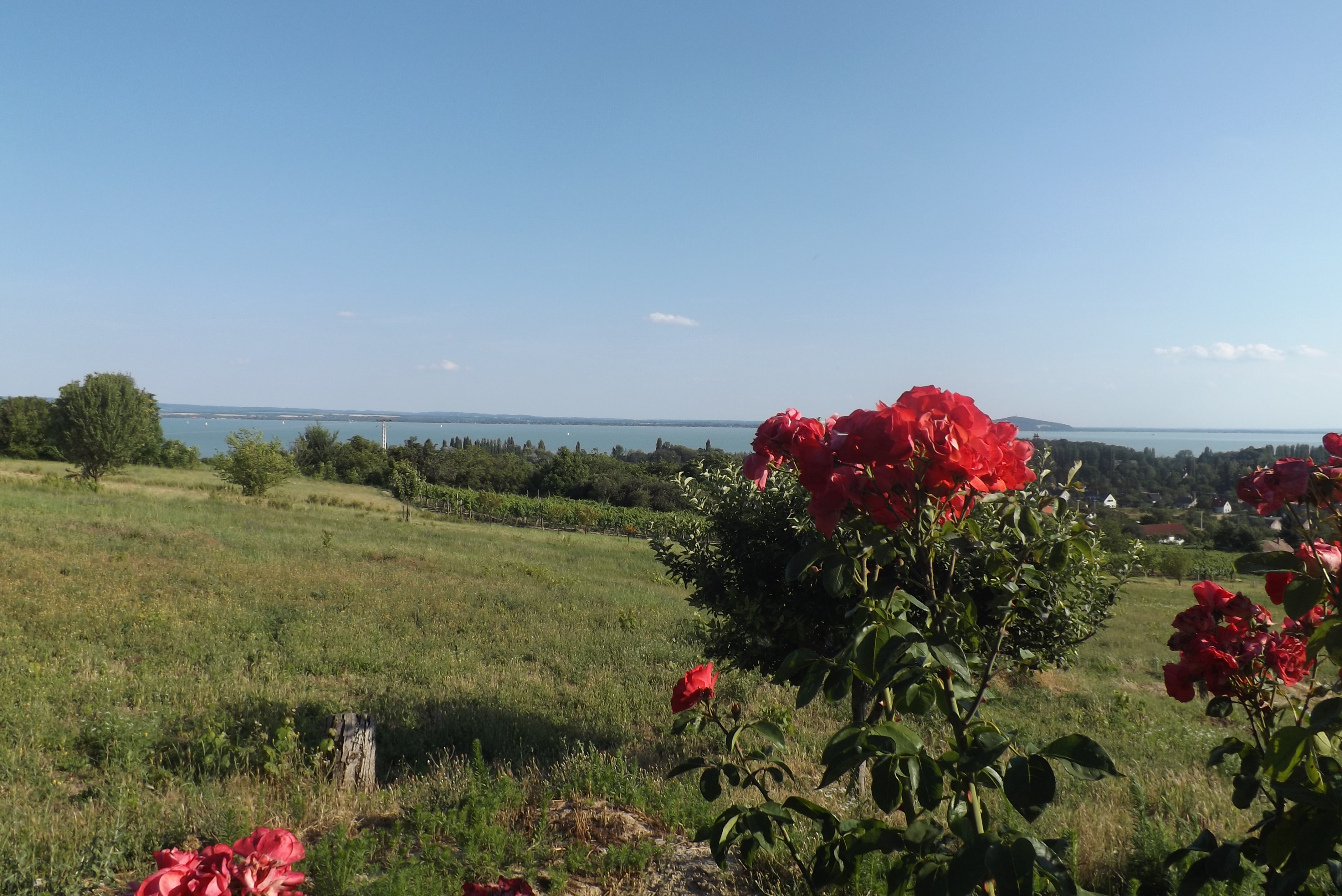 Kilátás a Balatonra, Ábrahámhegy